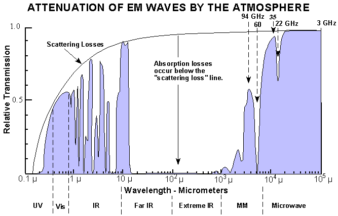 Absorption von eintreffender elektromagnetischer Strahlung beim Durchgang durch die Atmosphäre.